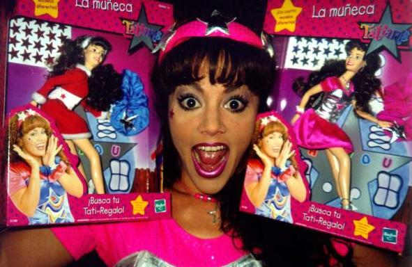 Tatiana Sosteniendo dos muñecas